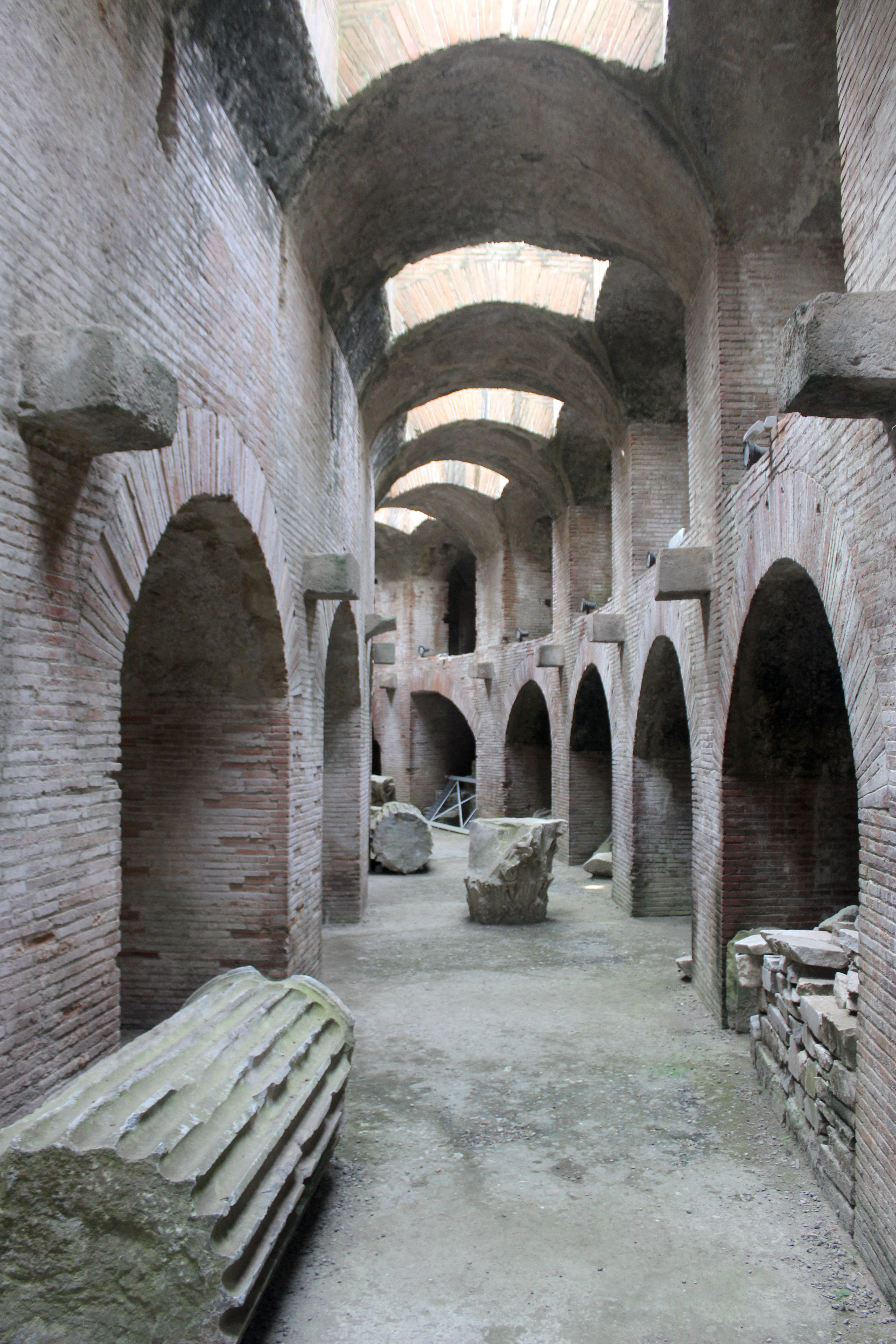 Pozzuoli, anfiteatro. Subestructuras.